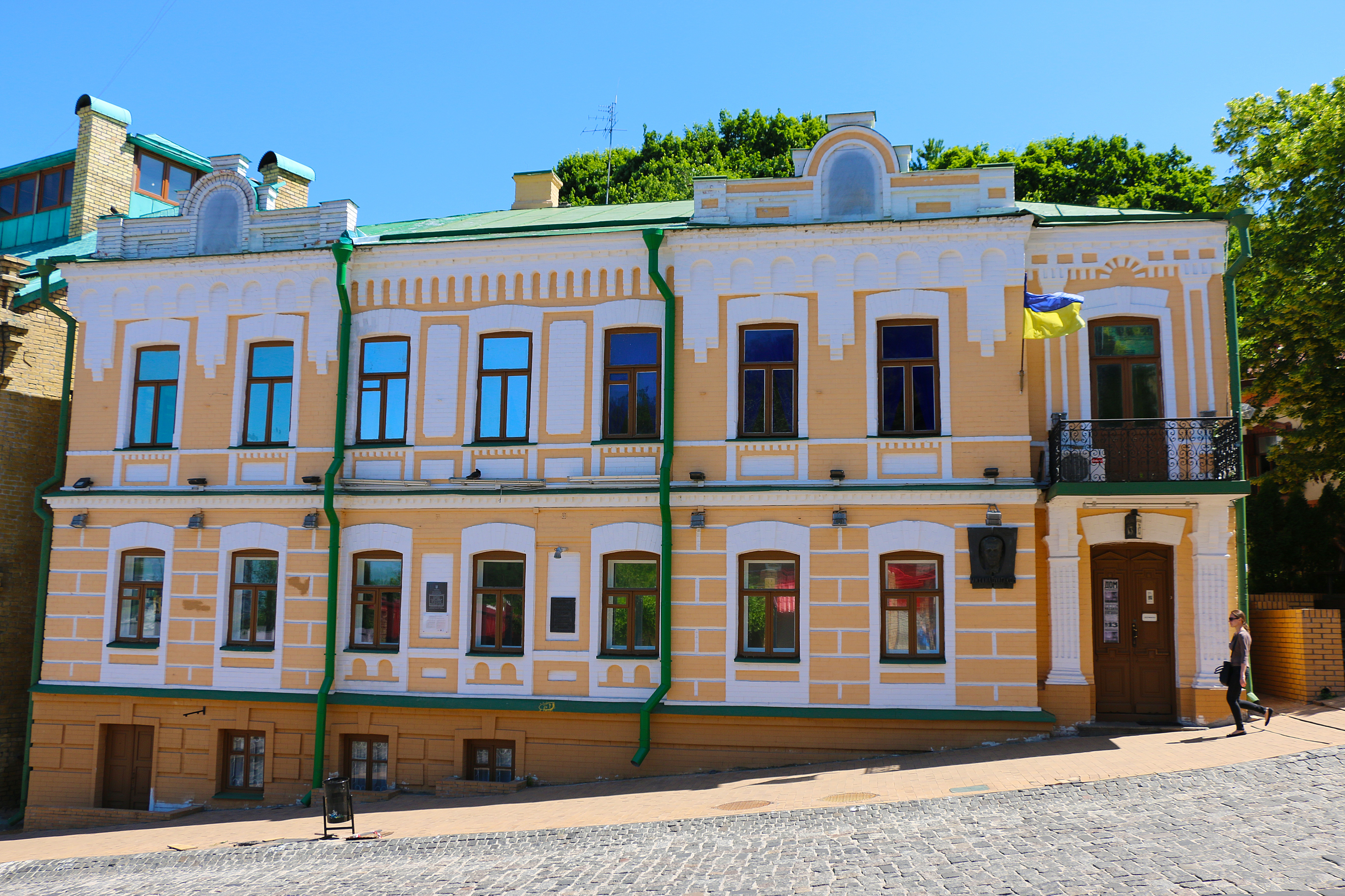 Садиба житлова, в якій проживав письменник М. П. Булгаков, Київ, Андріївський узвіз, 13